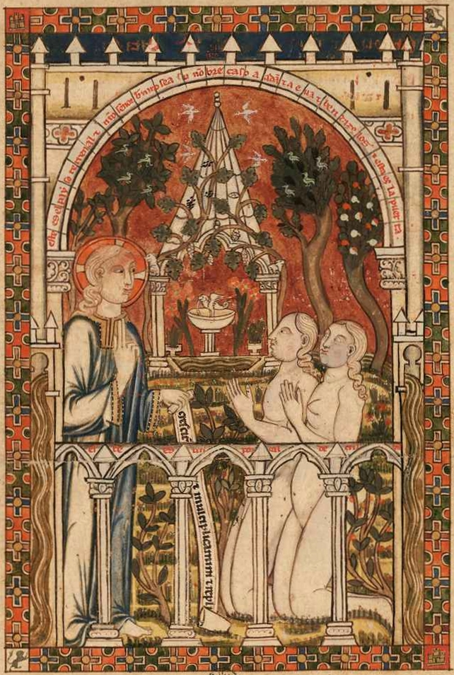 Fuero Juzgo. Manuscrito de 1241 que es traducción del Liber Iudiciorum del año 654, ley visigoda.